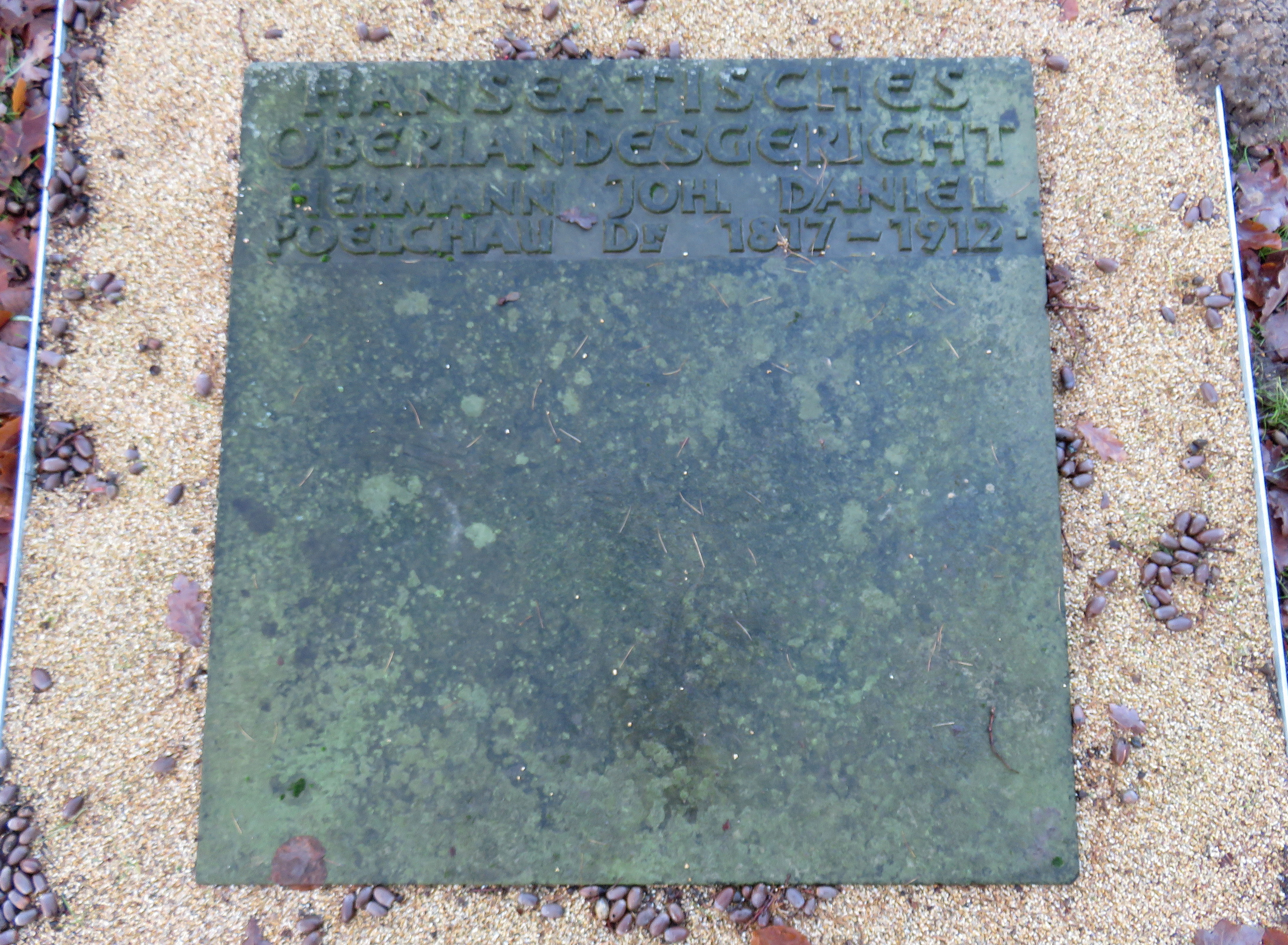 Sammelgrabmal Hanseatisches Oberlandesgericht im Bereich des Althamburgischen Gedächtnisfriedhofs auf dem Hamburger Friedhof Ohlsdorf zu Ehren von Hermann Poelchau.